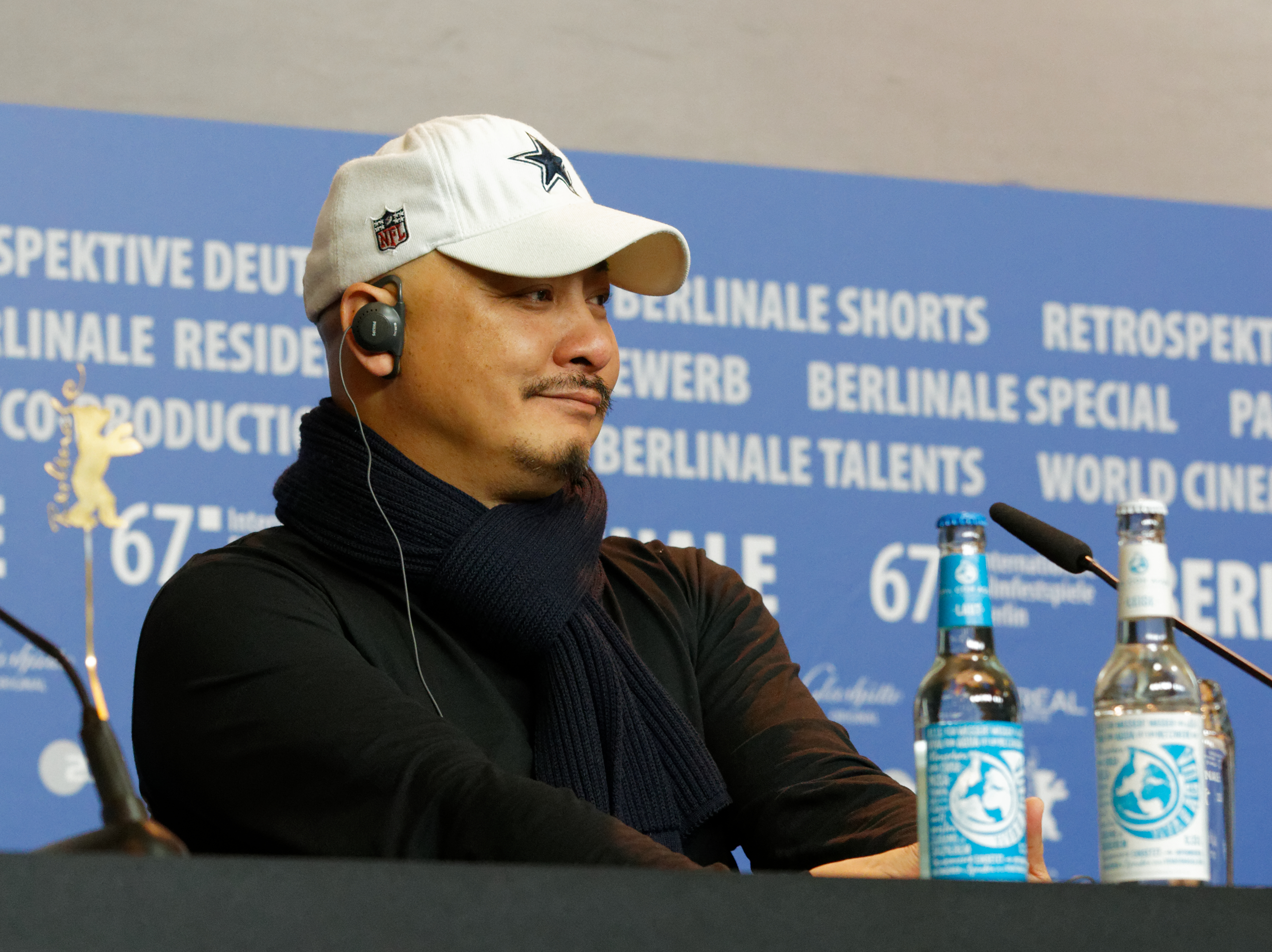 Wang Quan’an bei der Pressekonferenz der Internationalen Jury bei der Berlinale 2017